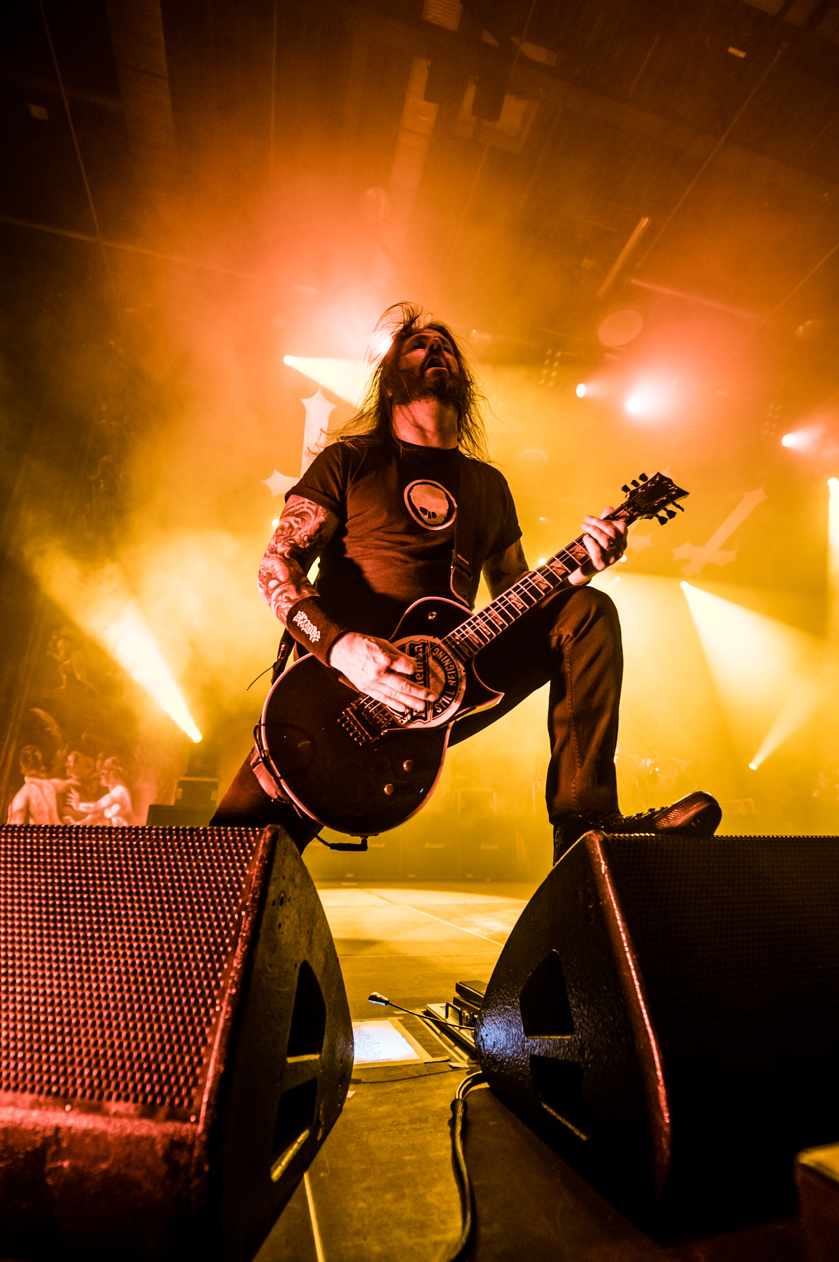 'Slayer Tour 2015 Bochum'